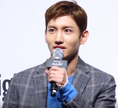 유튜브 오리지널 '아날로그 트립(Analog Trip)' 제작발표회가 27일 오전 서울 강남구 삼성동 SMTOWN 코엑스아티움에서 열렸다.